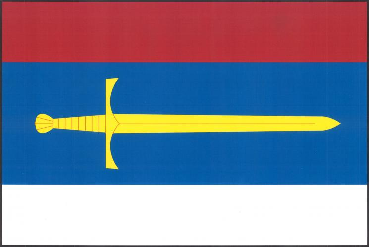 vlajka Stará Voda